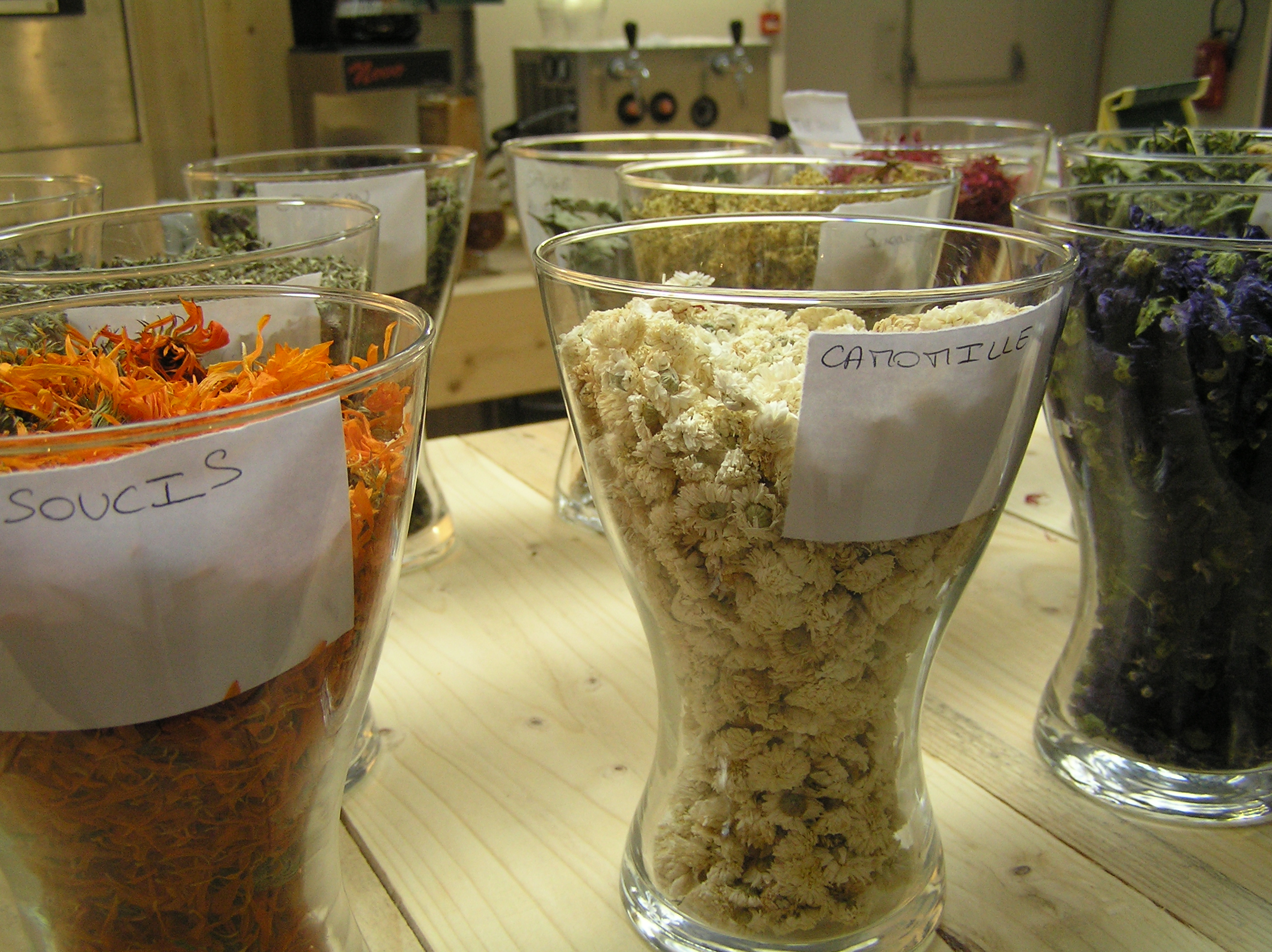 Herbal Tea